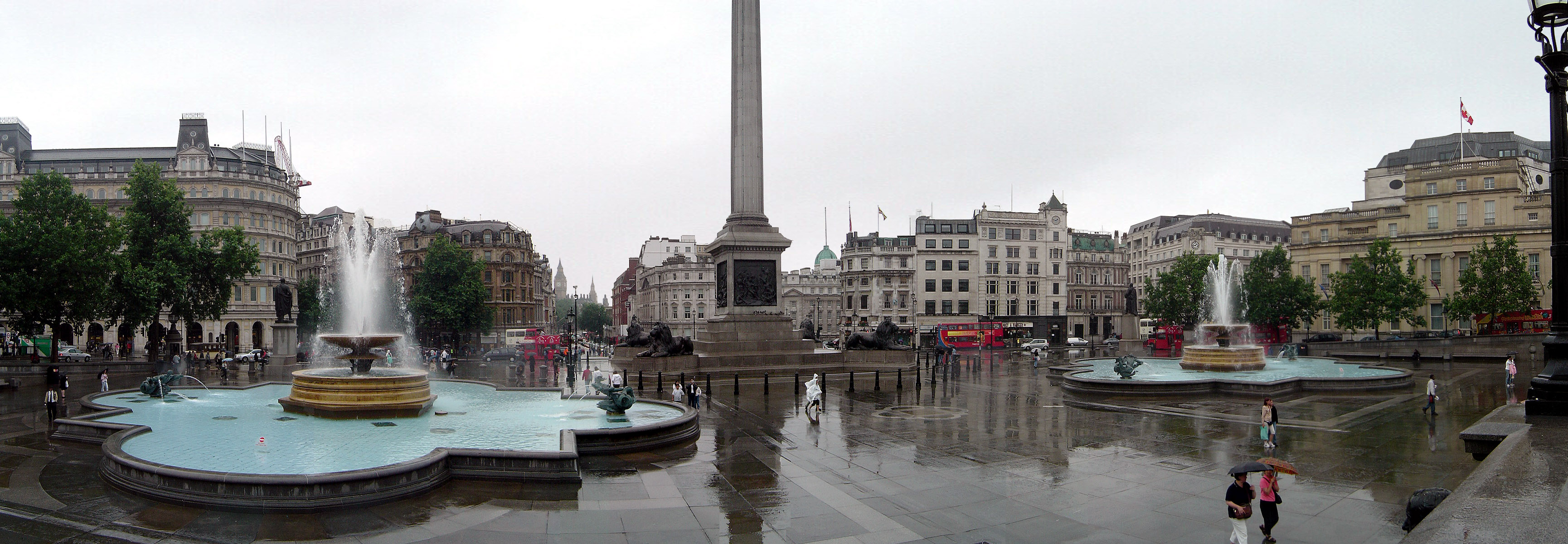 Trafalgar Square Panorama